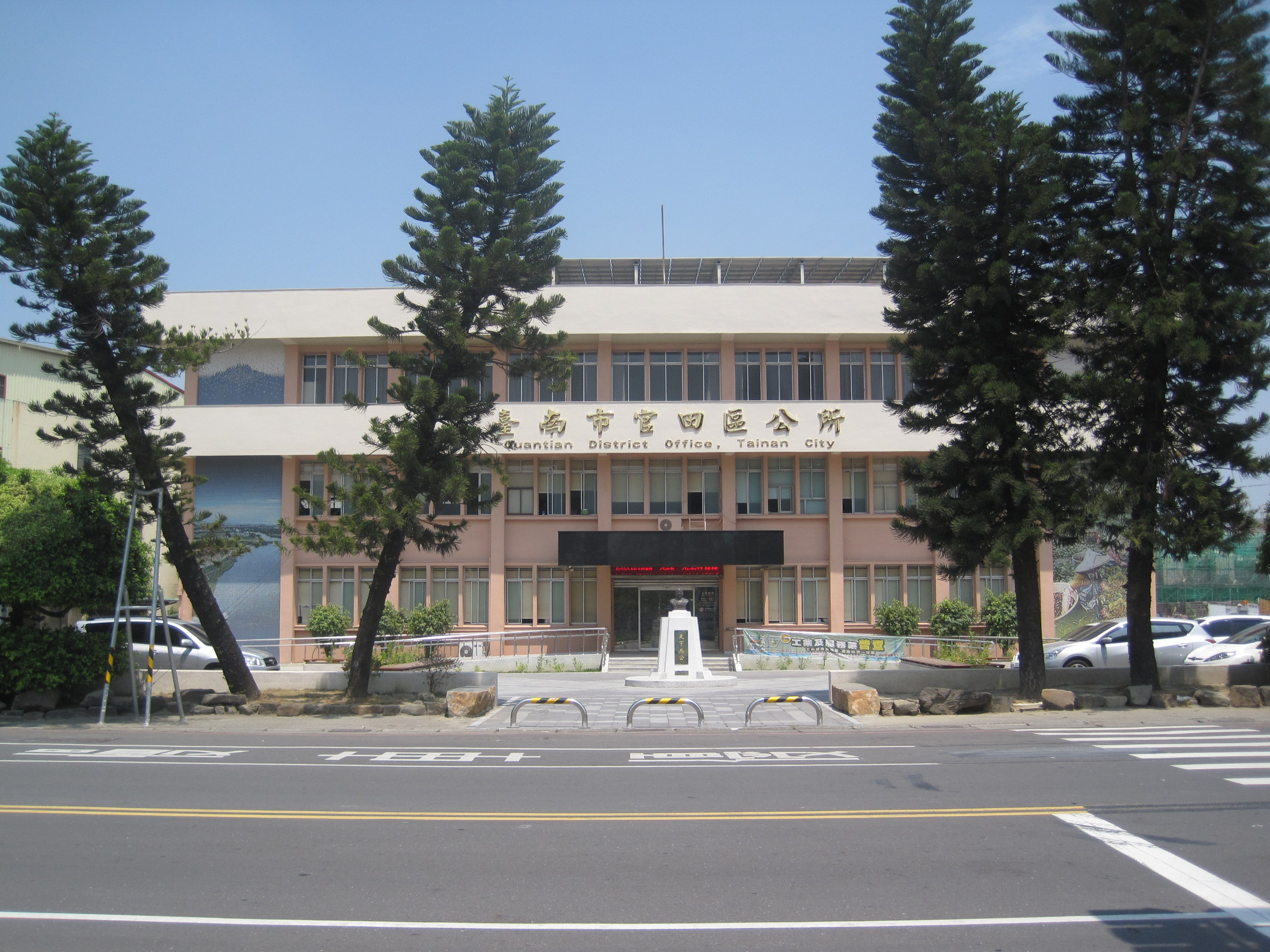 2017年的官田區公所